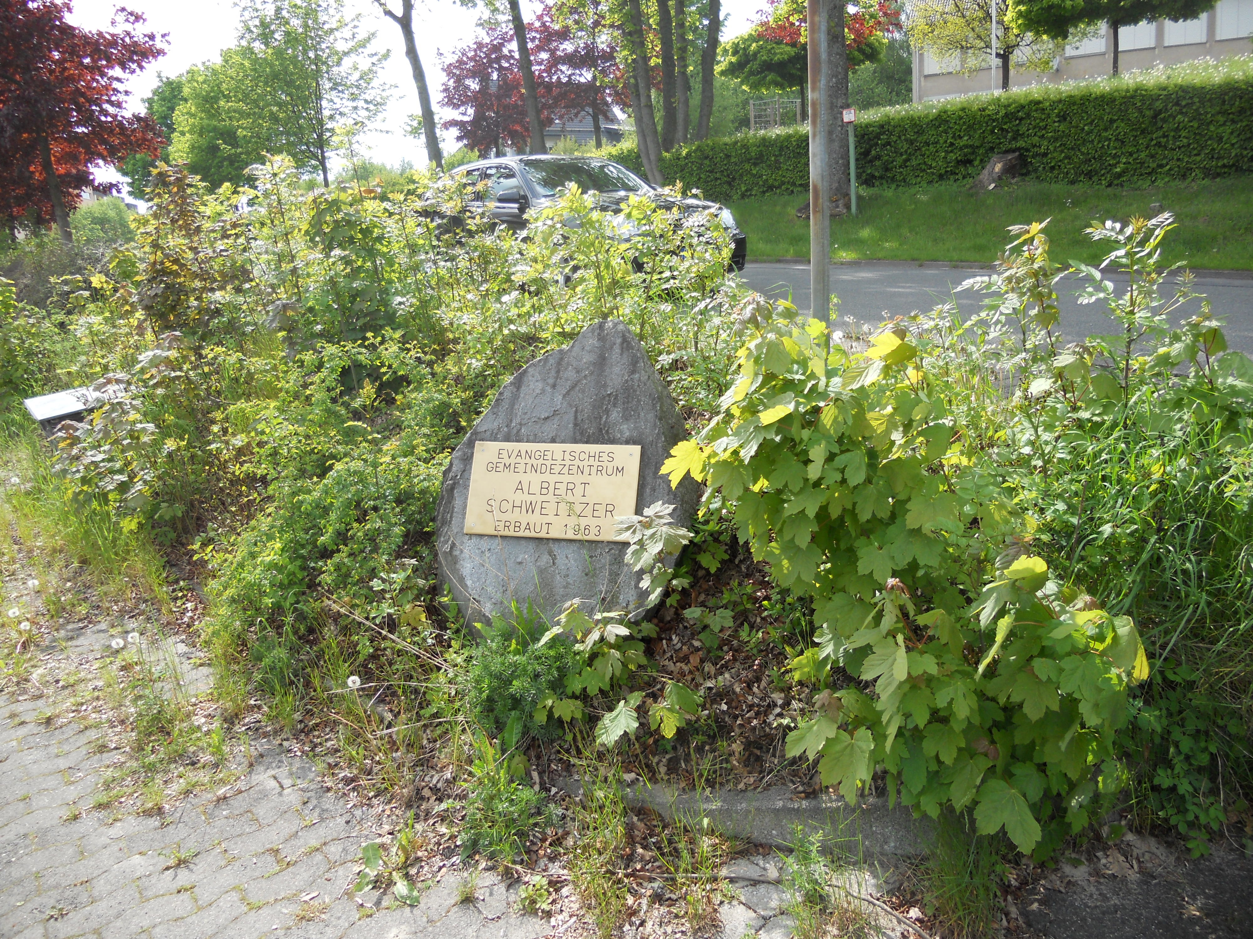 Brilon-Peterborn Gudenhagen Gedenkstein Evangelisches Gemeindezentrum